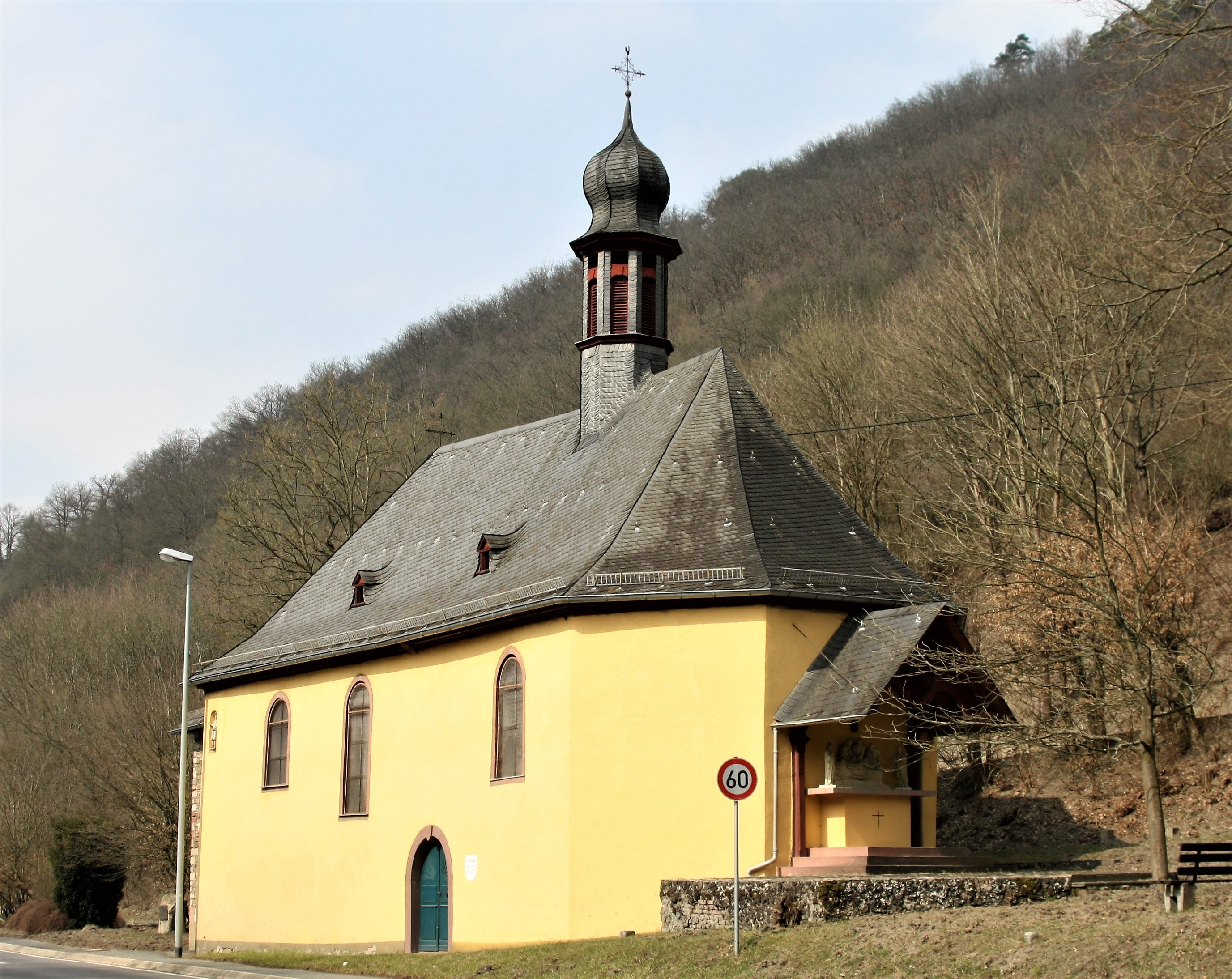 Kreuzkapelle Lorch / Rhein